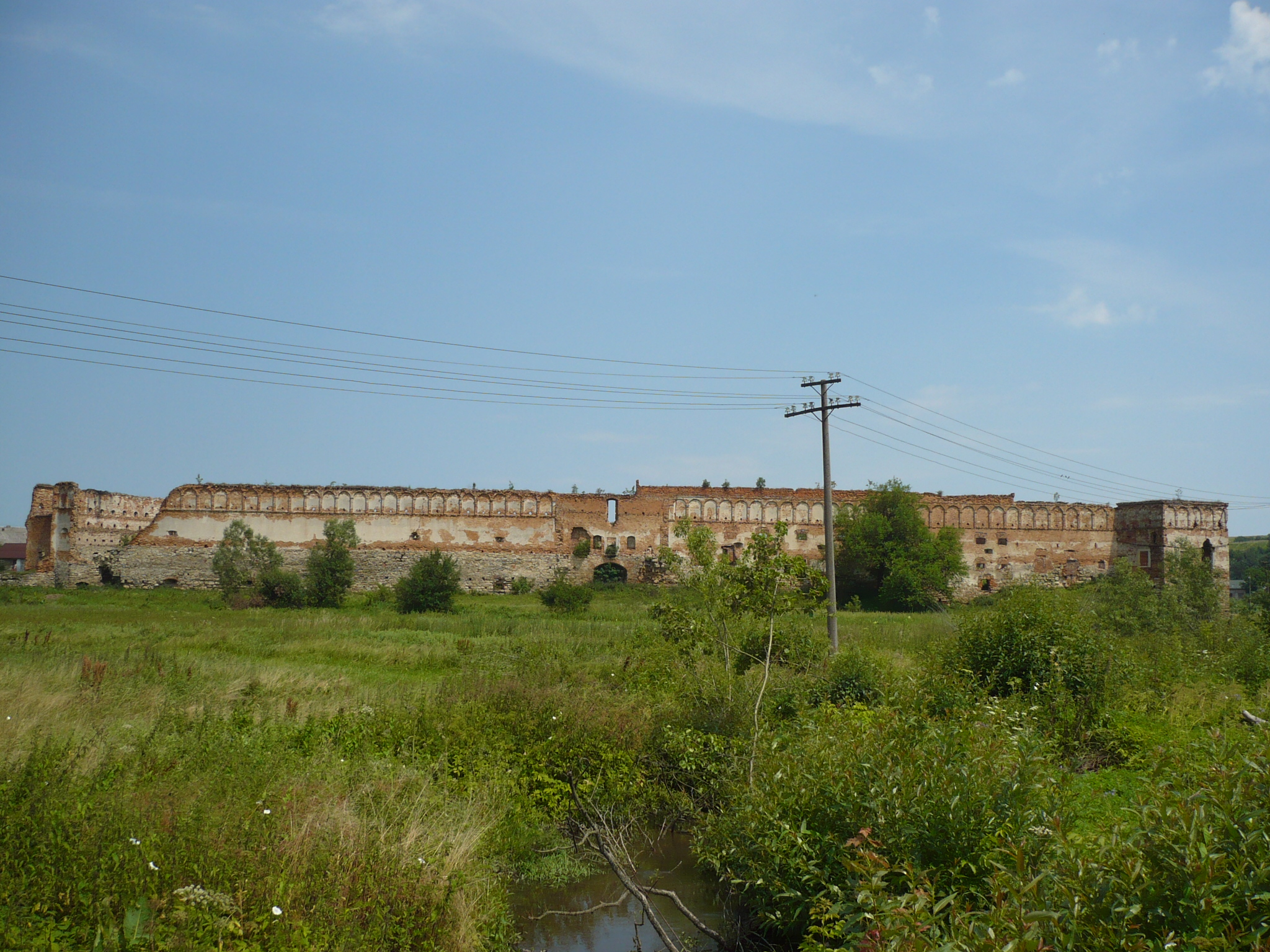 Zamek księcia Zasławskiego w Starym Siole.